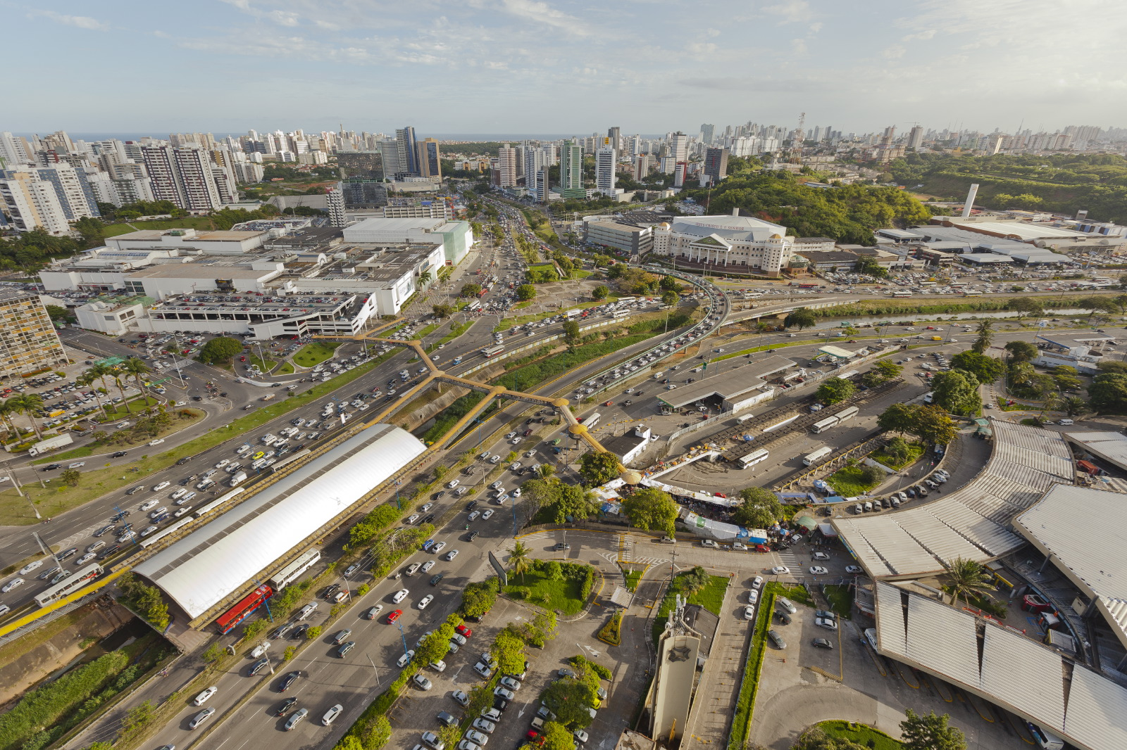 Vista aérea da região do Iguatemi, o Rio Camaragibe, o Iguatemi Salvador, Estação Iguatemi, templo da IURD e o Terminal Rodoviário de Salvador, em Salvador.